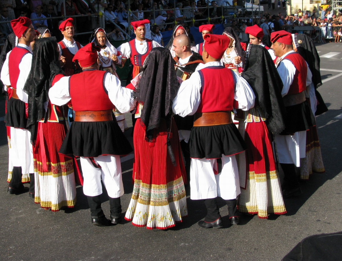 "ballu tundu" del gruppo di Oristano